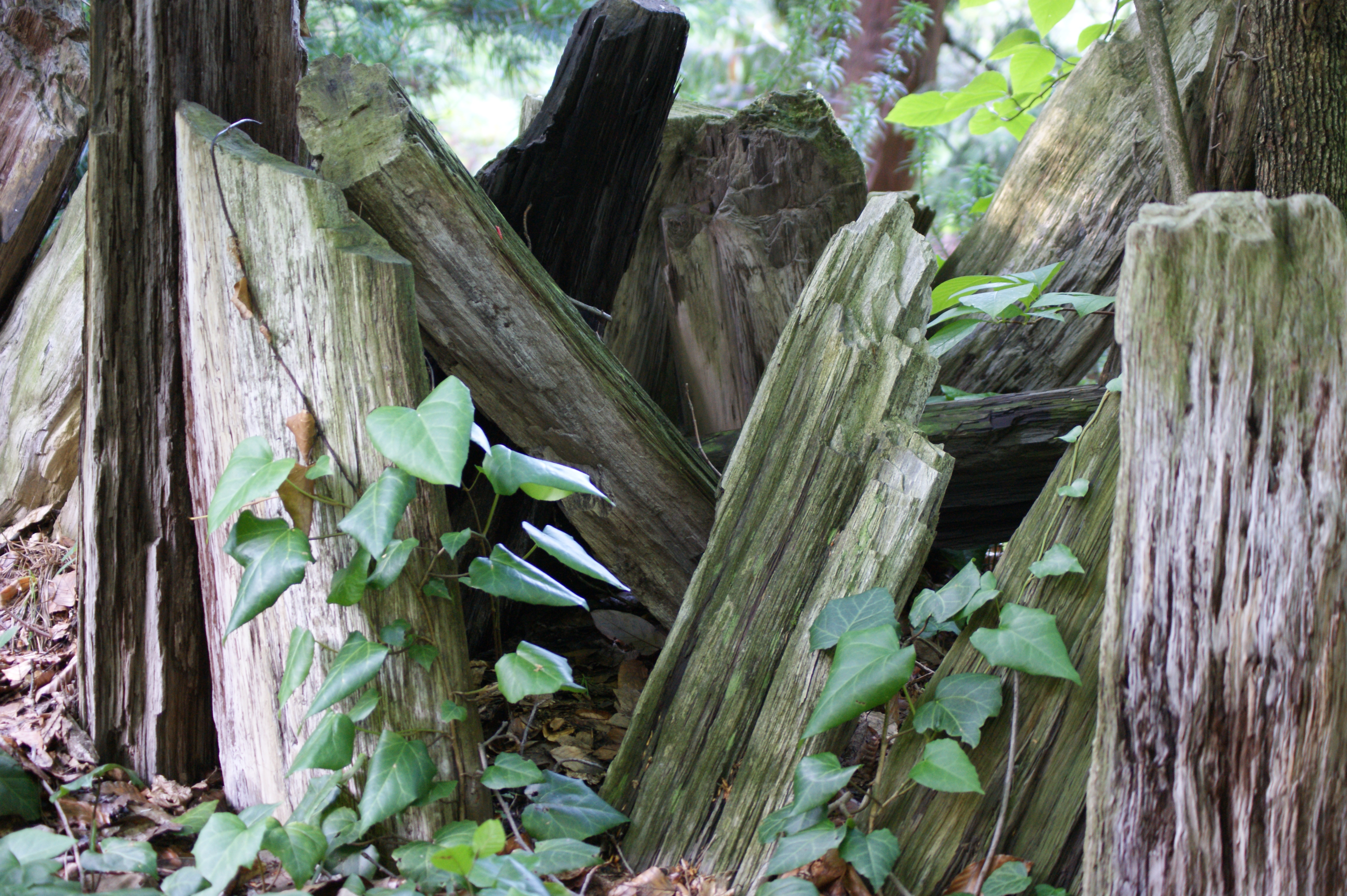 Tharandt, Forstbotanischer Garten (Landesarboretum): Verkieselte Stämme der Gattungen Taxodium und Sequoia aus dem Tagebau Espenhain (bei Leipzig); tertiärer Braunkohlenwald; ca. 33 Mio. Jahre alt